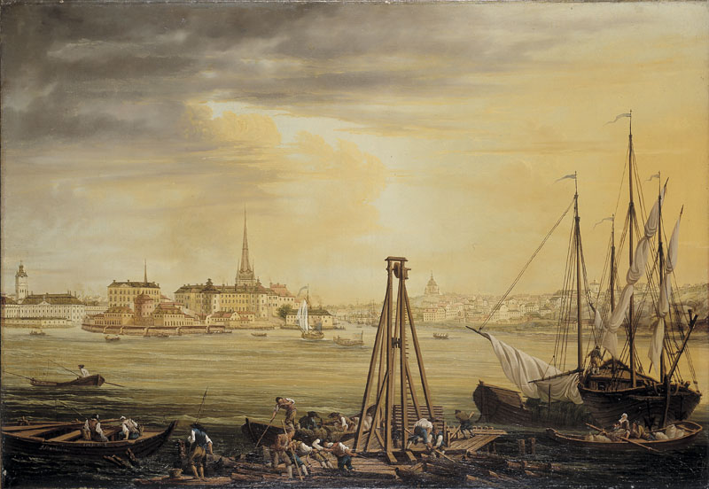 Utsikt över Riddarhuset, Riddarholmen och Södermalm i Stockholm